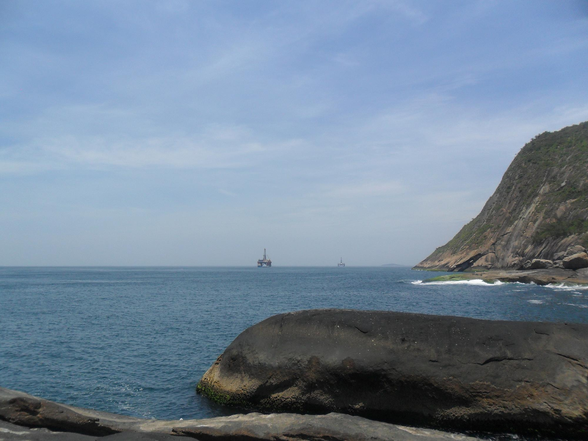 Mar de Itacoatiara